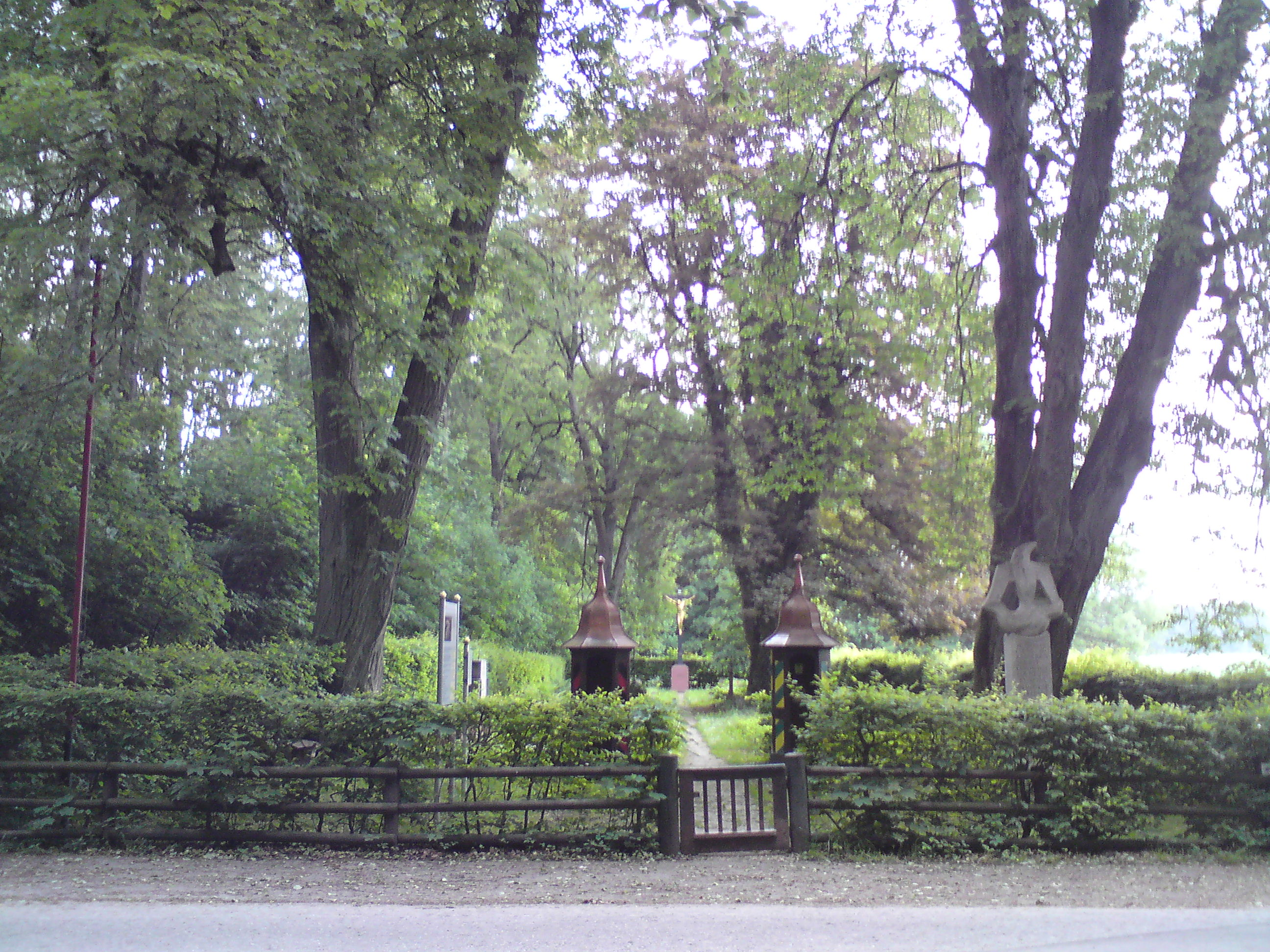 Gesamtansicht des historischen Soldatenfriedhofes Obermarchtal